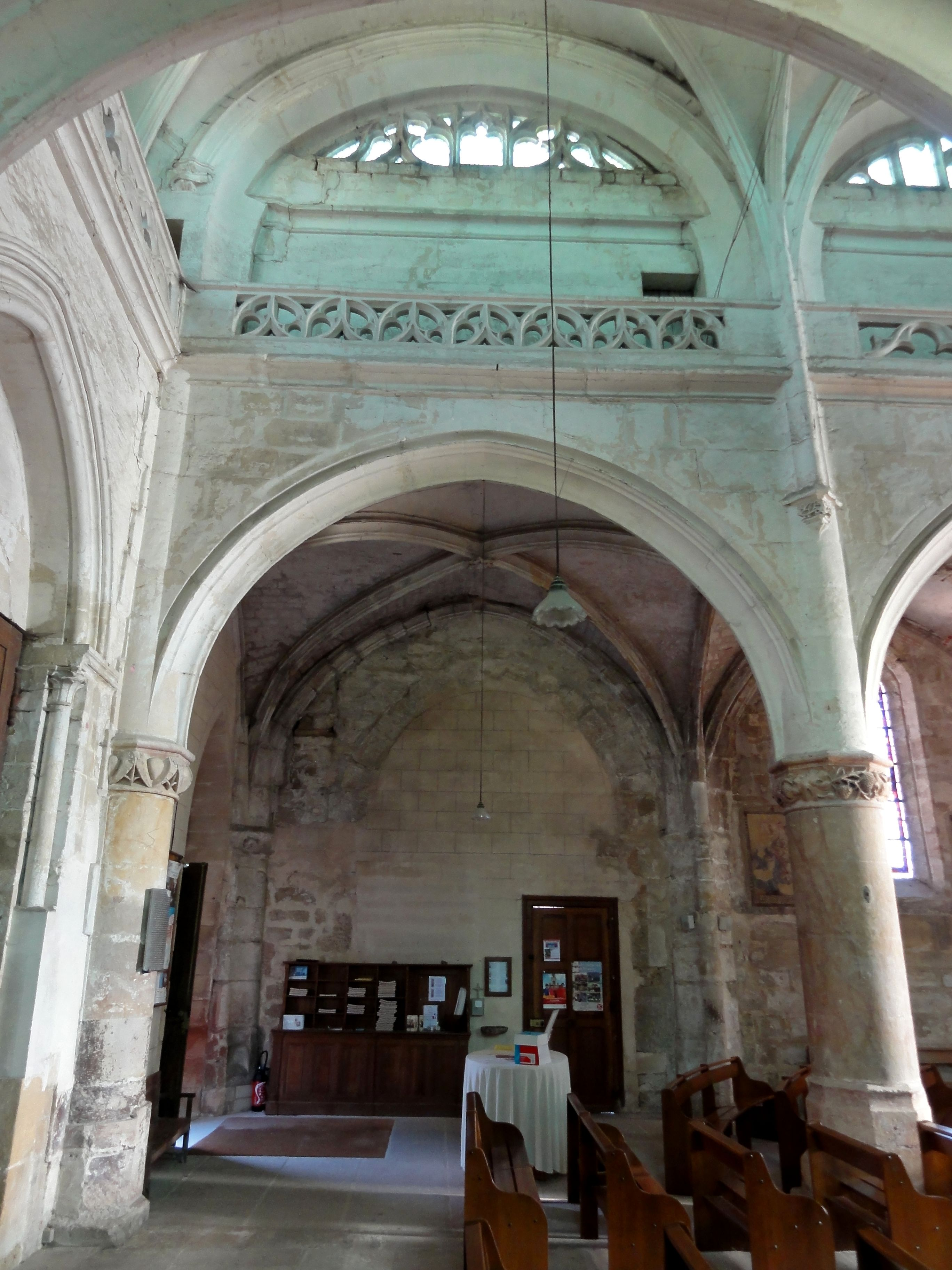 Nef, première travée côté nord.